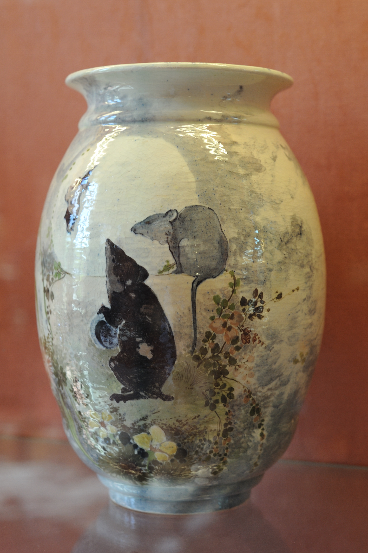 Vase décoré de deux rats, terre cuite dite « faïence impressionniste », manufacture Laurin de Bourg-la-Reine, vers 1875, exposé au musée national de la porcelaine Adrien Dubouché, Limoges, Haute-Vienne, France